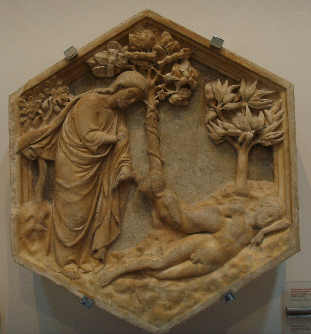 Formella 02, la creazione di eva, andrea pisano